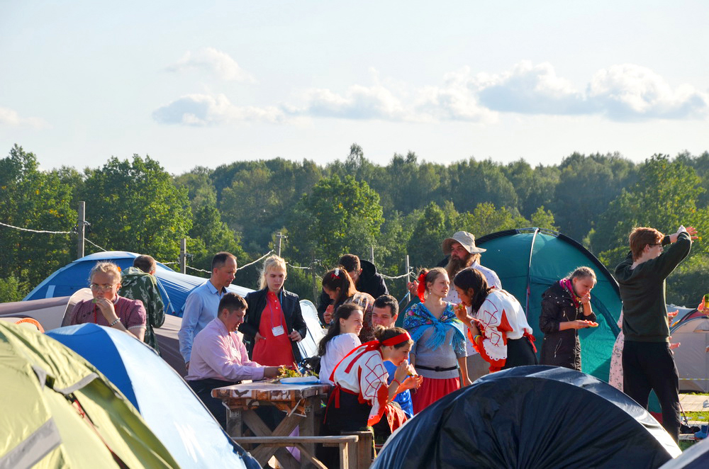 Ужин на фестивале "Братья"